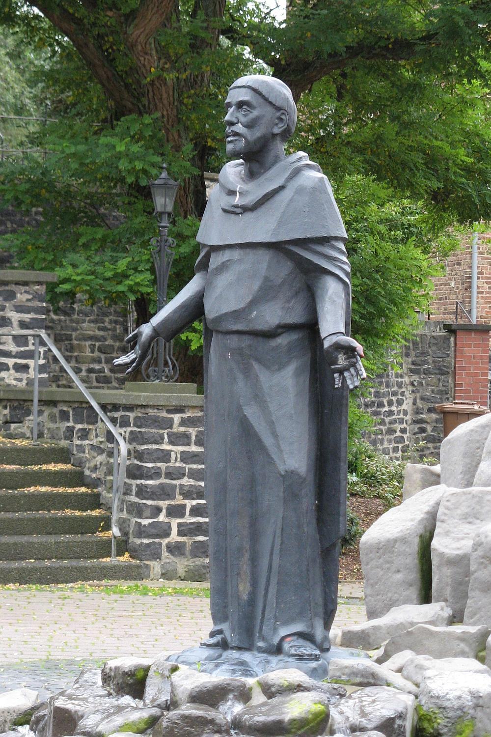 Denkmal für Gottfried von Beselich vor der Kirche in Obertiefenbach (errichtet am 26.11.1999)